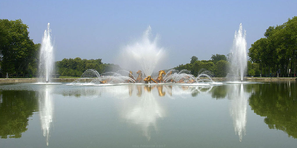 Le Bassin du char d'Apollon à Versailles